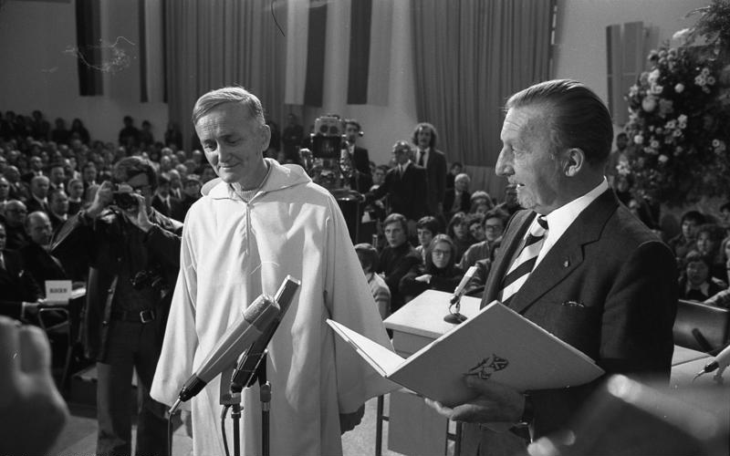 Der Friedenspreis des Börsenvereins des Deutschen Buchhandels wird an den Gründer und Prior der ökumenischen Bruderschaft von Taize, Roger Schütz, durch den Vorsteher des Börsenvereins Dr. Ernst Klett in Anwesenheit von Bundespräsident Walter Scheel in der Pauls-Kirche überreicht.